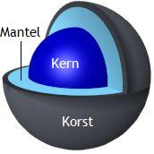 De binnenkant van Pluto met verklaring Gemaakt door medewerker van Wikipedia (met het programma Blender)